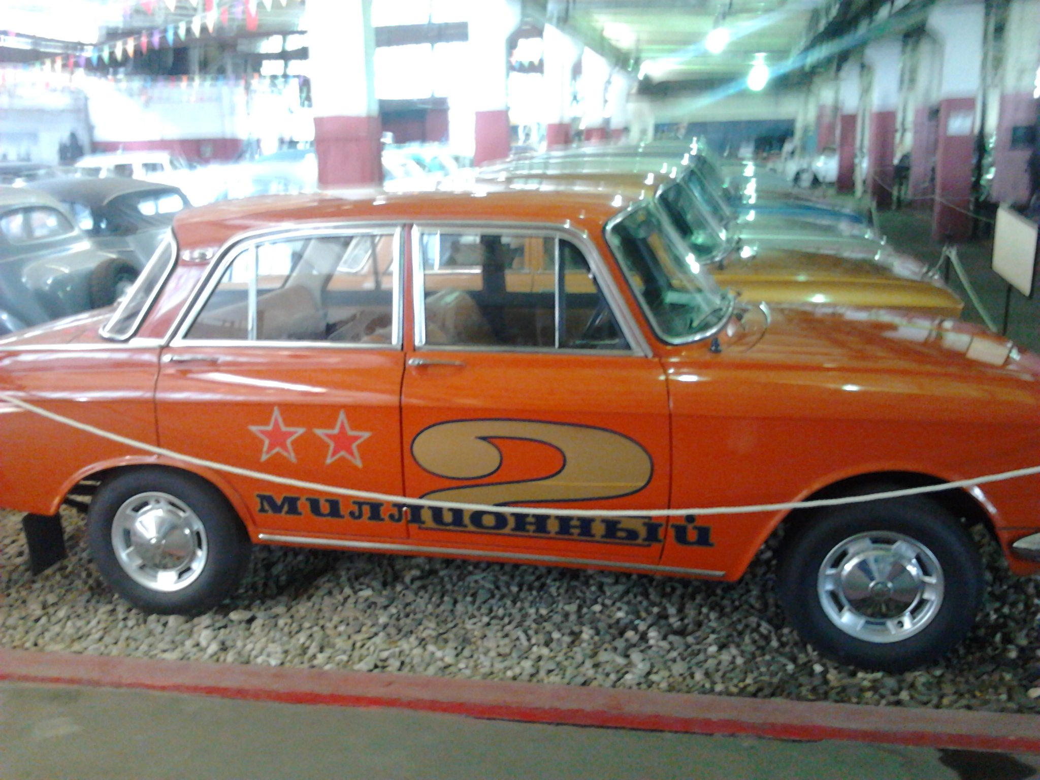 Автомобиль марки Москвич